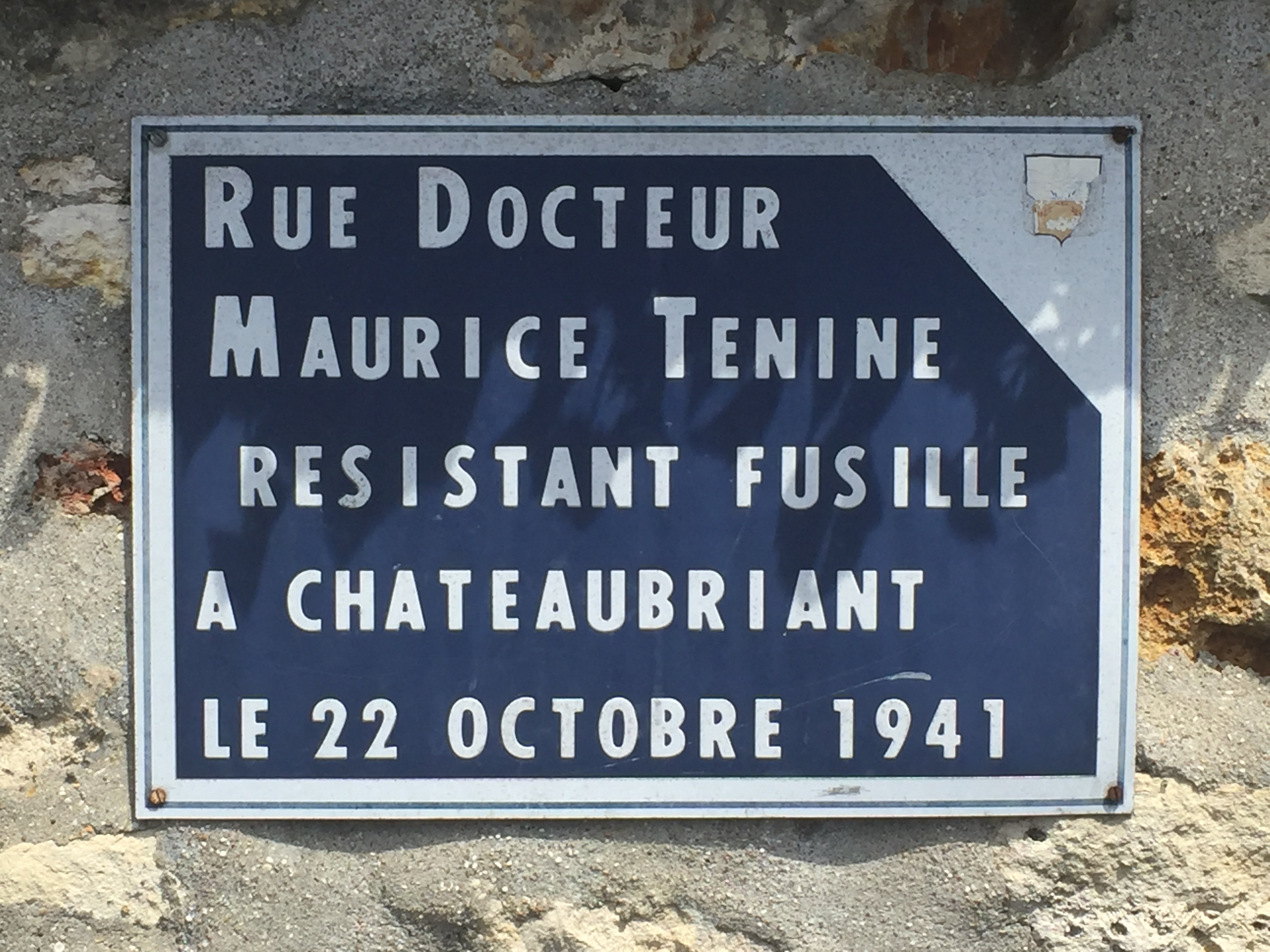 Plaque de rue du résistant Maurice Tenine à Wissous.